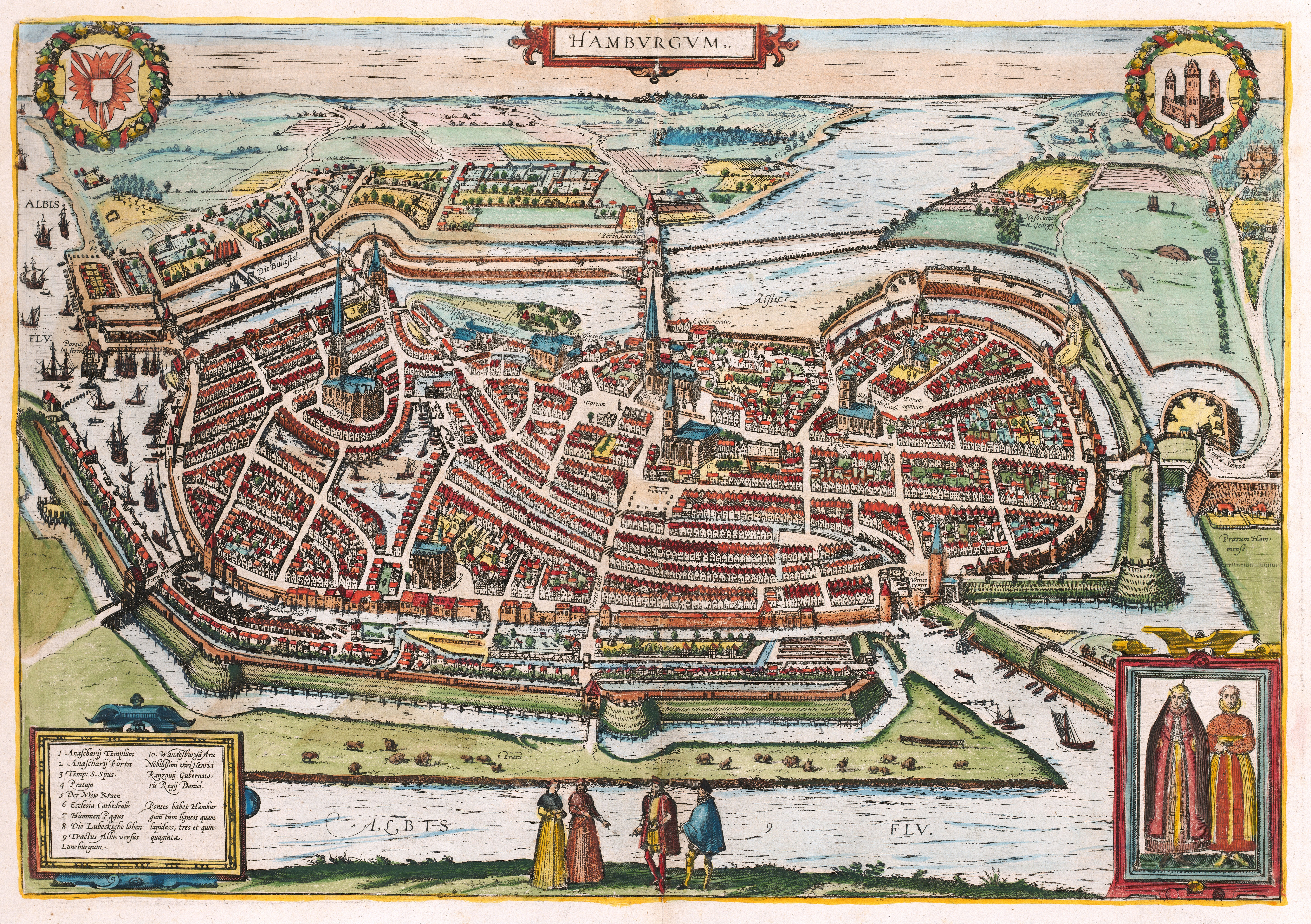 Ohne Kt.-Netz. - Titelkartusche oben Mitte, Legendenkartusche unten links, 2 Wappen oben links und rechts. - Mit Gebäudeverz. - Mit lat. Text auf der Rücks. - Zählung auf der Rücks.: 36